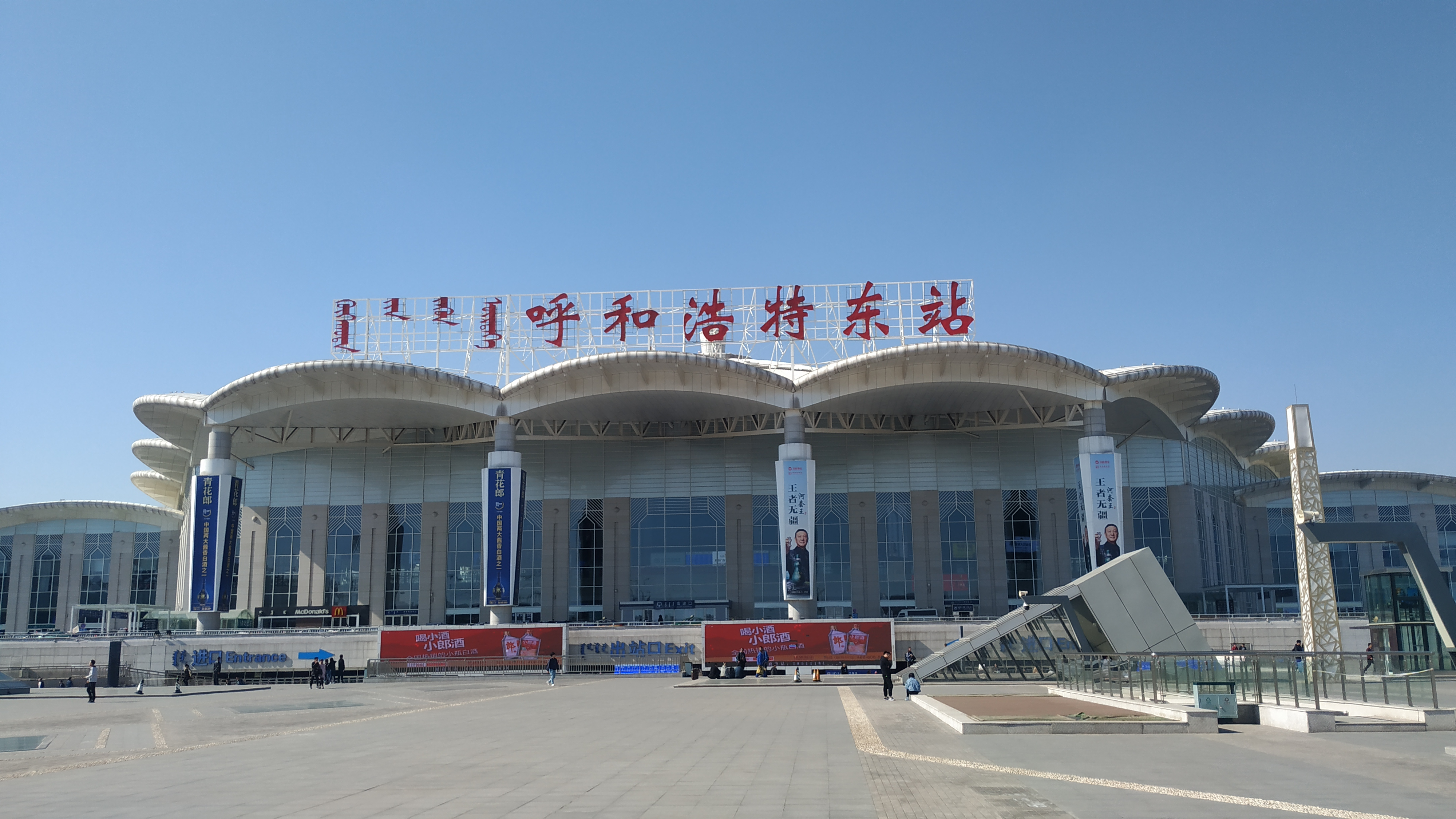 中文（中国大陆）: 呼和浩特东站